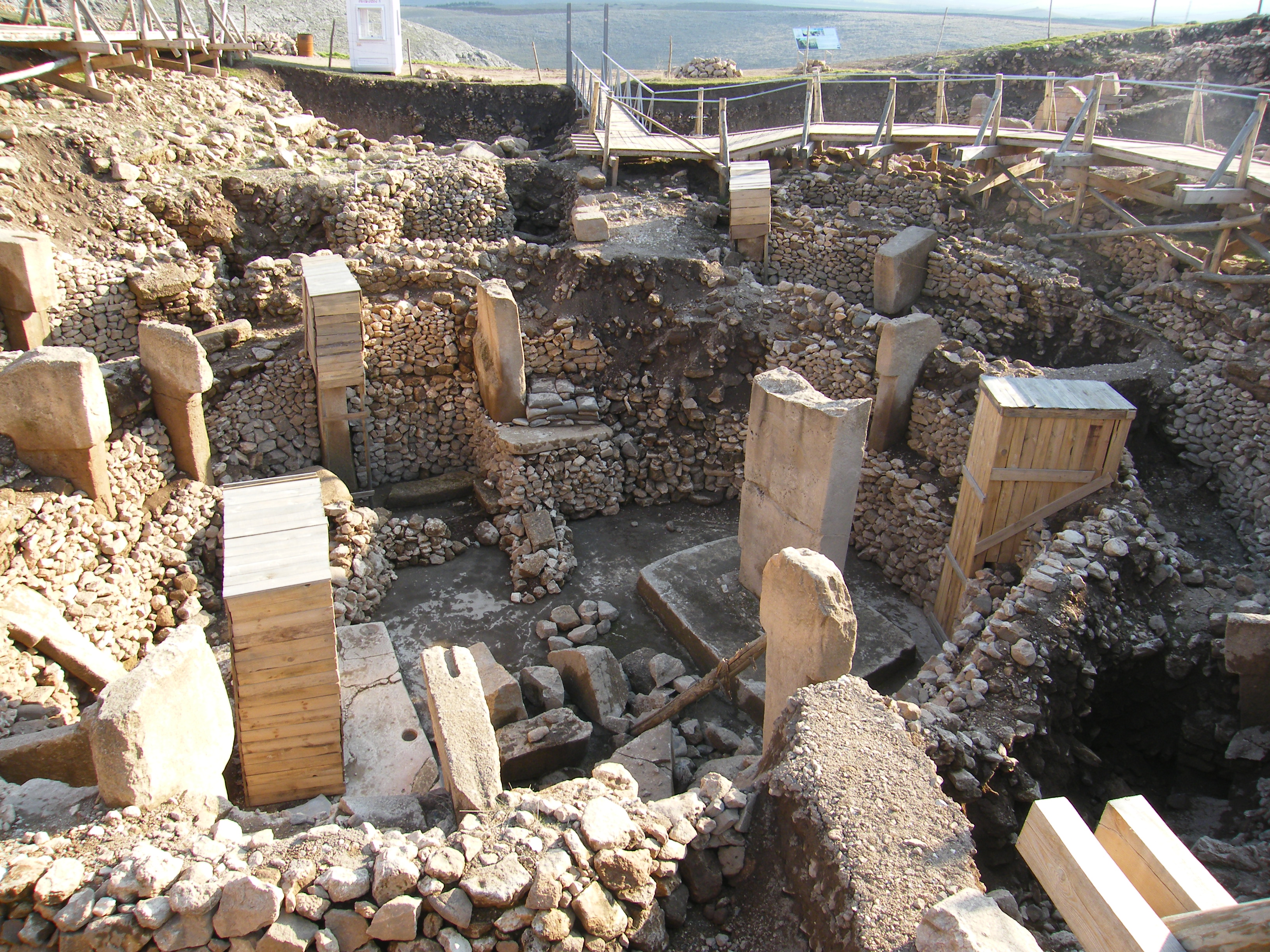 göbekli tepe ş.urfa